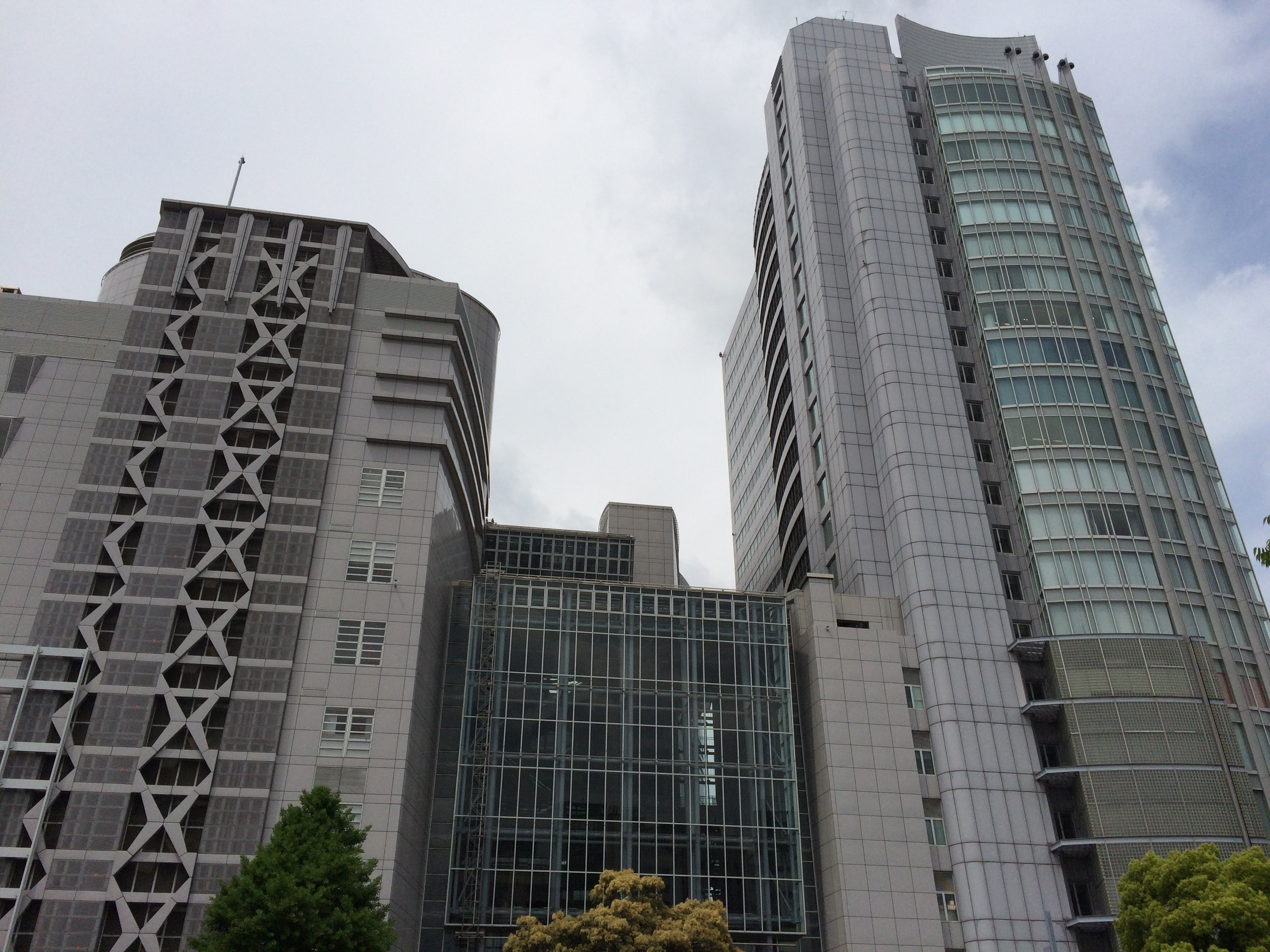 ナディアパーク